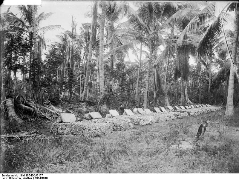 19 deutsche Gräber, 66 Askarie starben bei Jassini